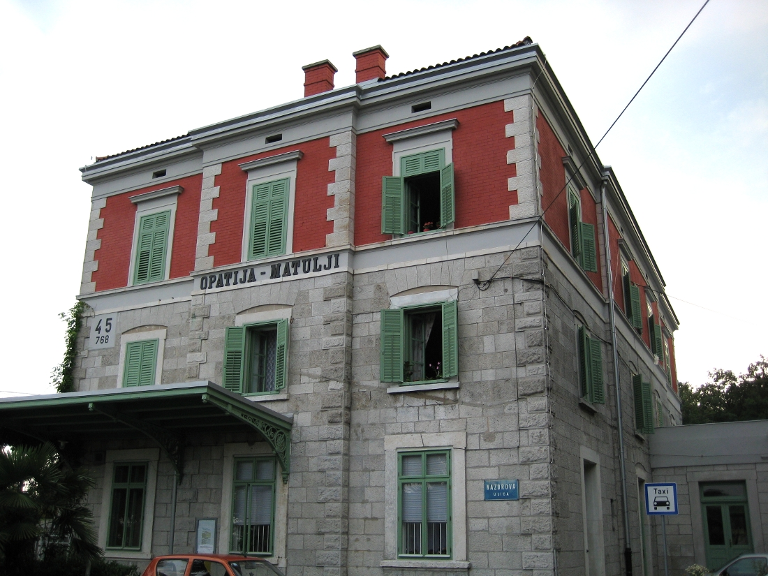 Željeznička postaja Opatija - Matulji